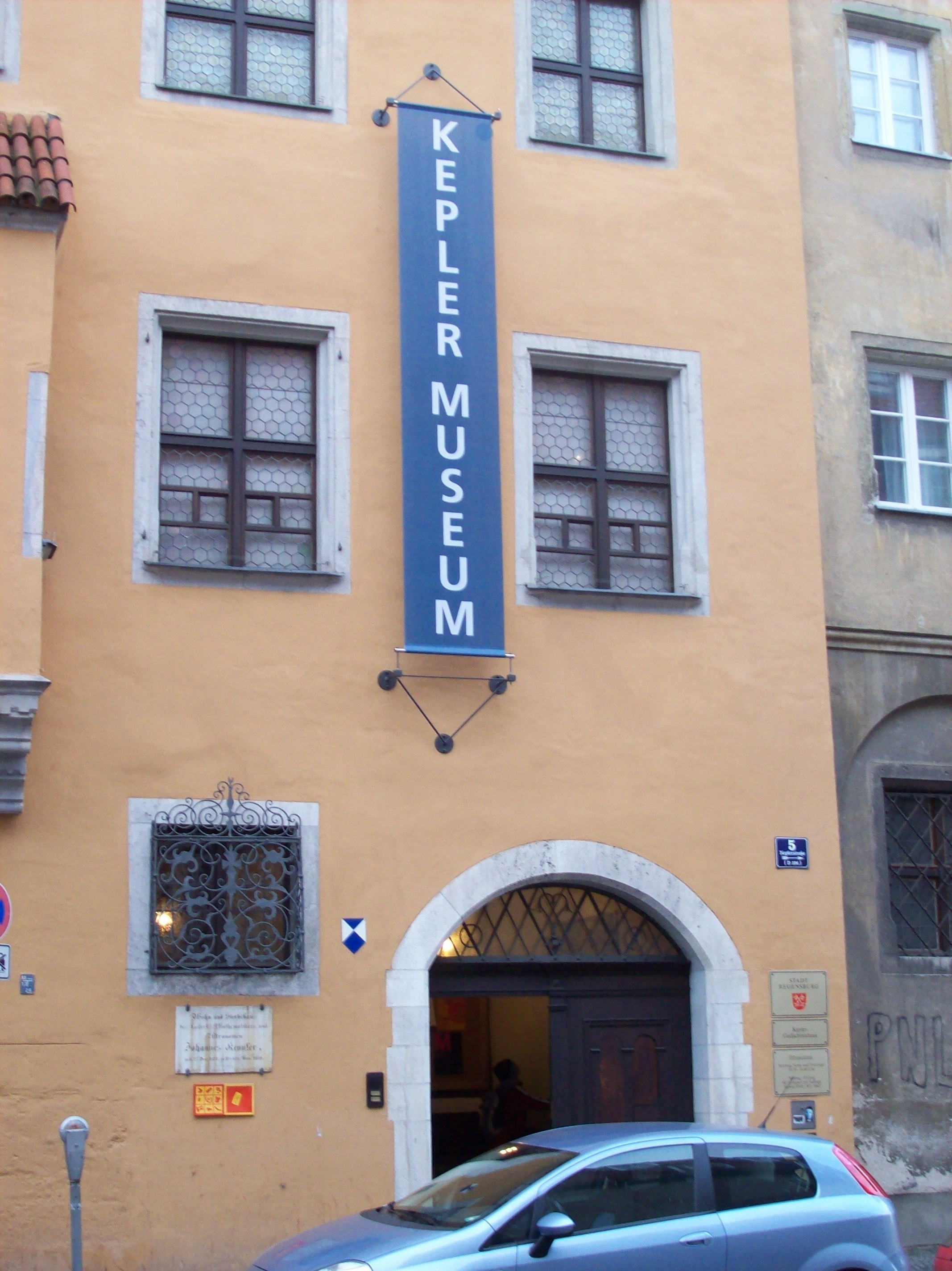 Regensburg, Keplerstr. 5: Sterbehaus Keplers, "Kepler-Gedächtnishaus"